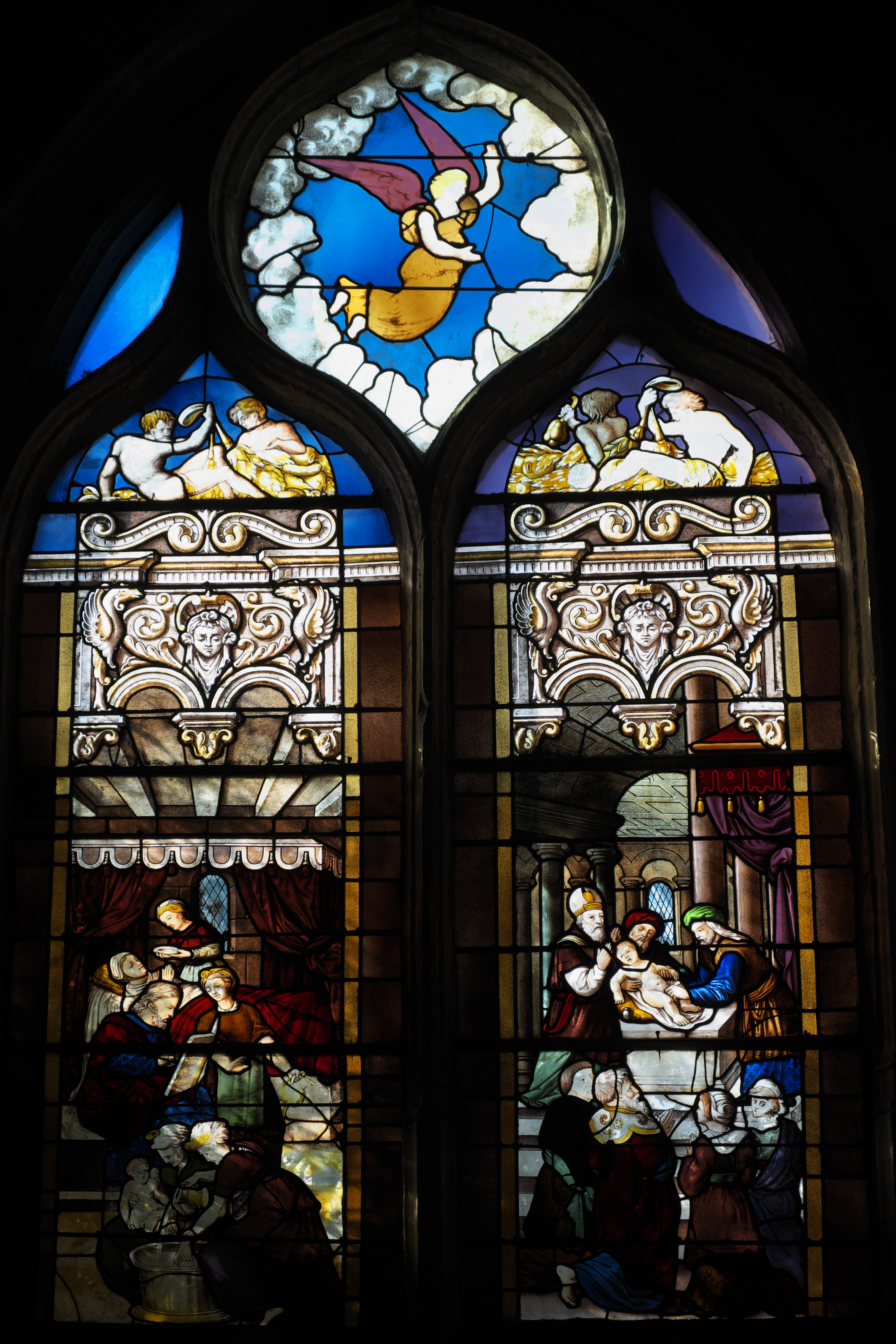 Katholische Pfarrkirche Saint-Germain in Andrésy im Département Yvelines (Île-de-France/Frankreich), Bleiglasfenster aus der Mitte des 16. Jahrhunderts; Darstellung: Geburt Johannes des Täufers (links), Beschneidung Jesu (rechts); oben: Engel